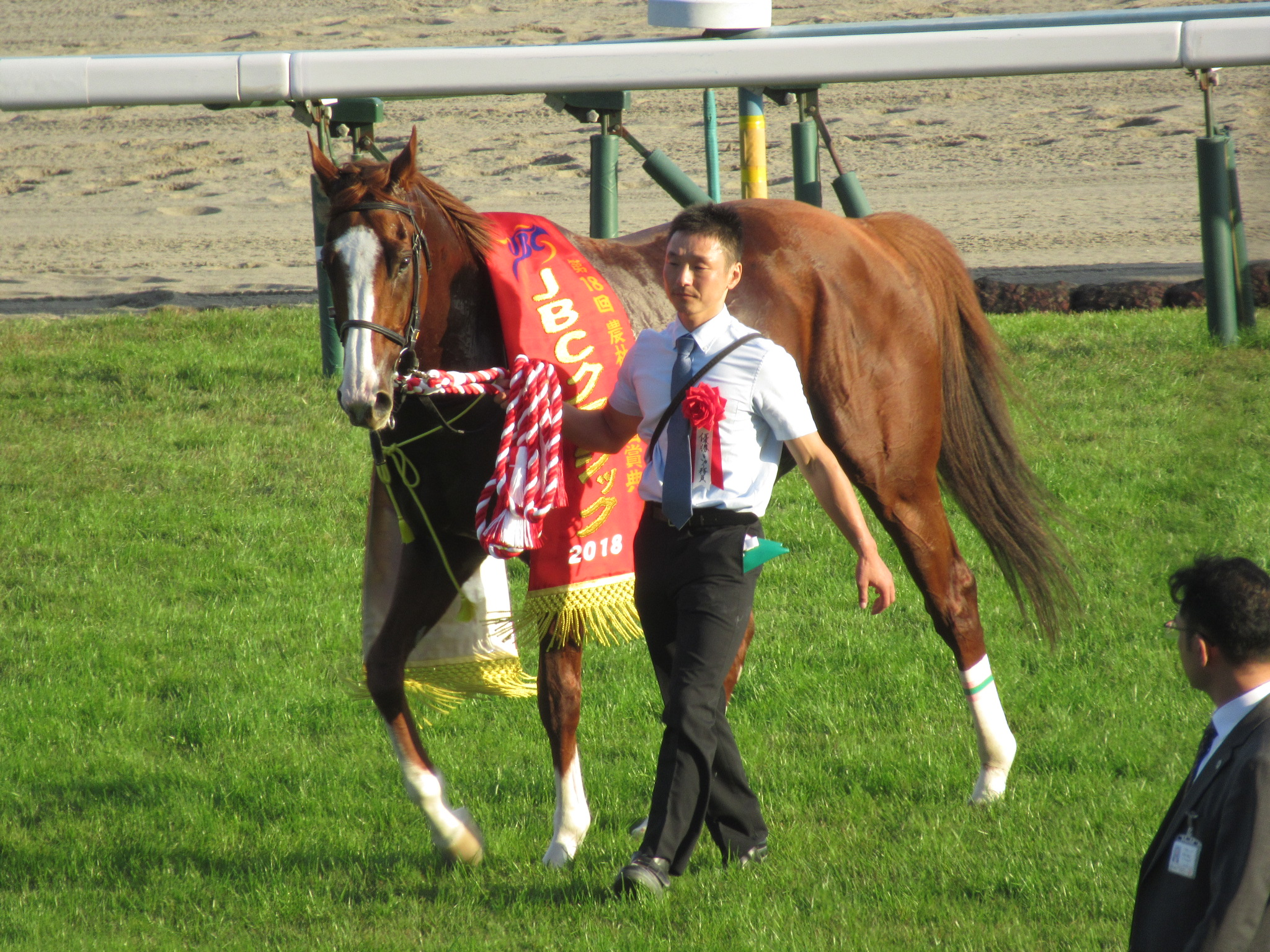 2018年 JBCクラシック優勝馬 ケイティブレイブ号